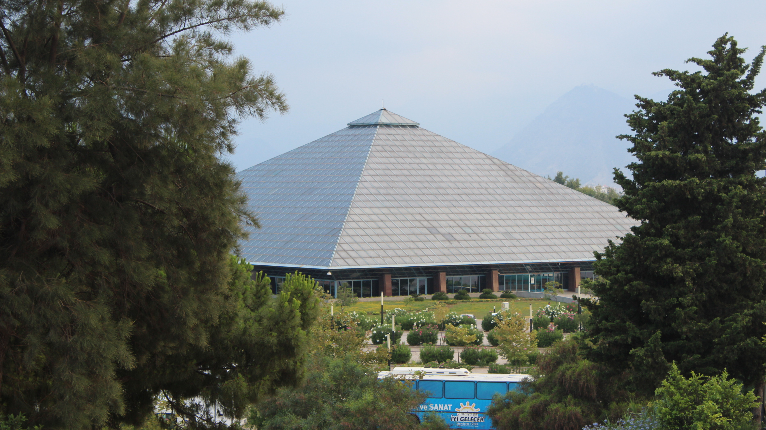 Cam Piramit